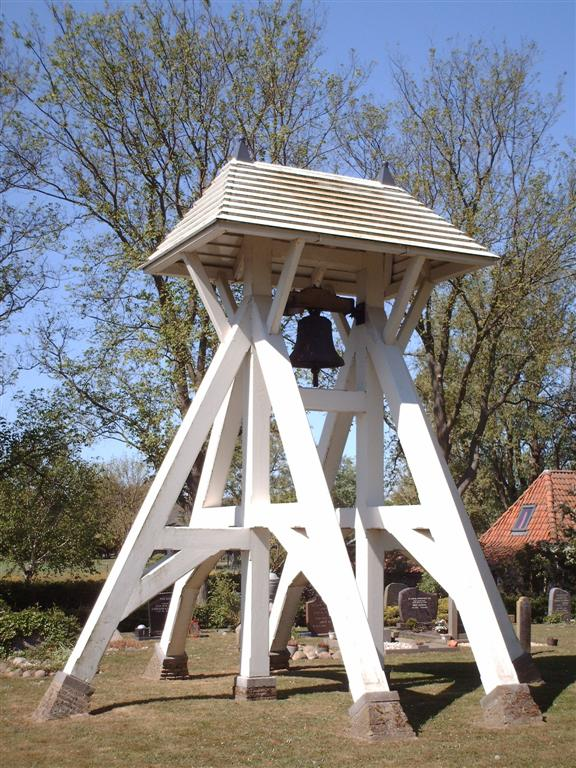 Klokkenstoel in Mirns